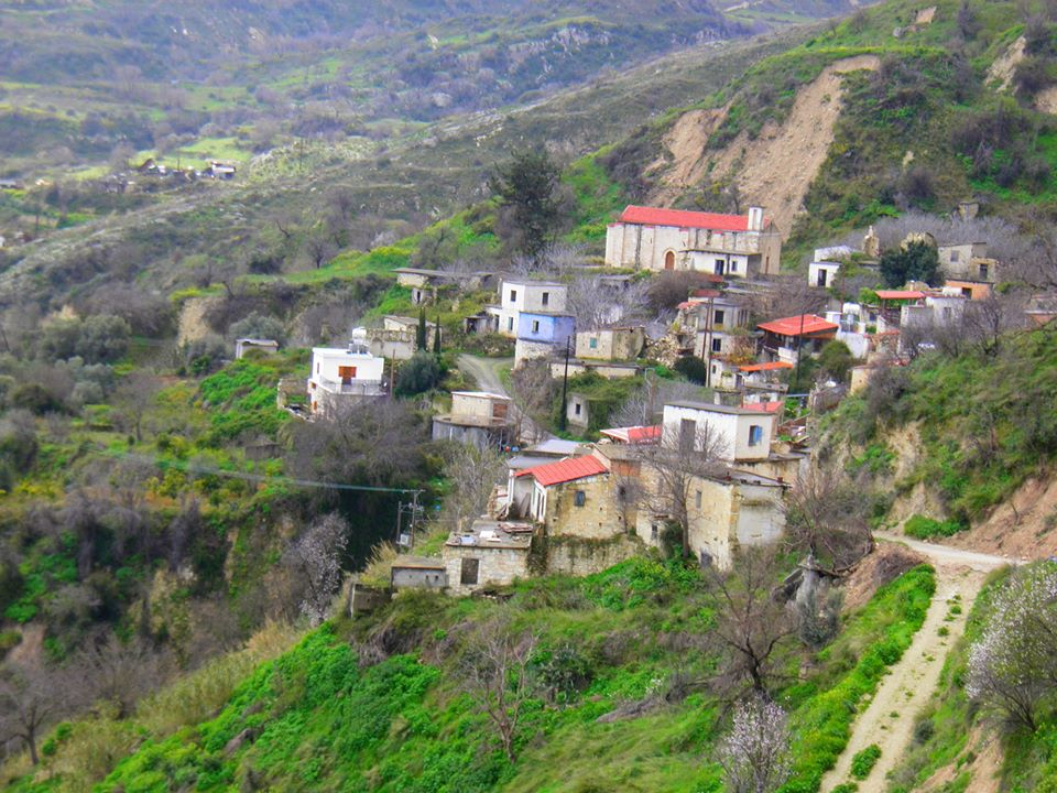 Θελέτρα